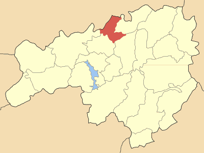 Dimos Pamisou (Δήμος Παμίσου) in Karditsa Perfecture (Νομός Καρδίτσας), Greece